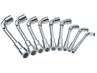 Clés à pipe.